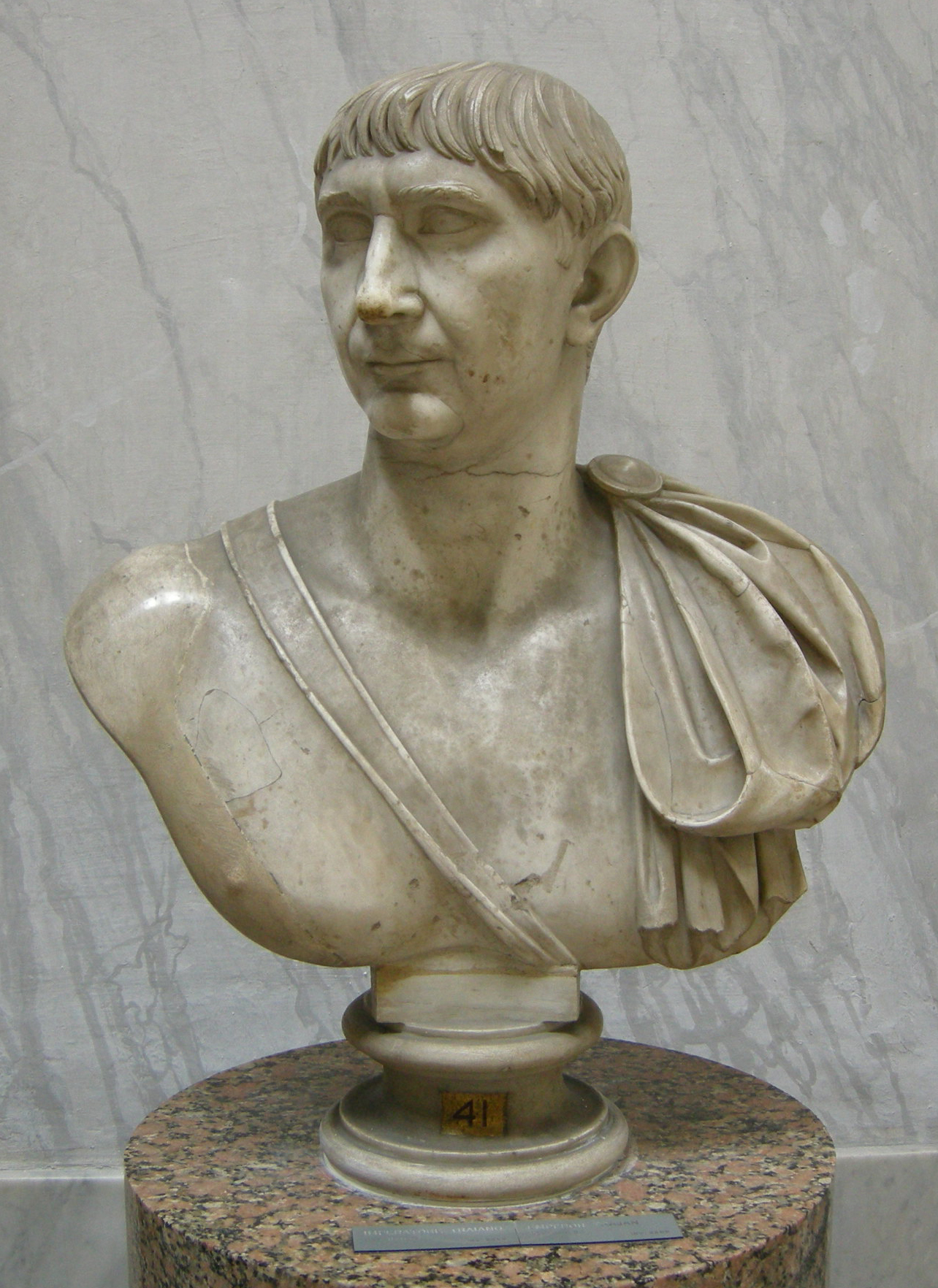 Ritratto del decennale di traiano, inv. 2269